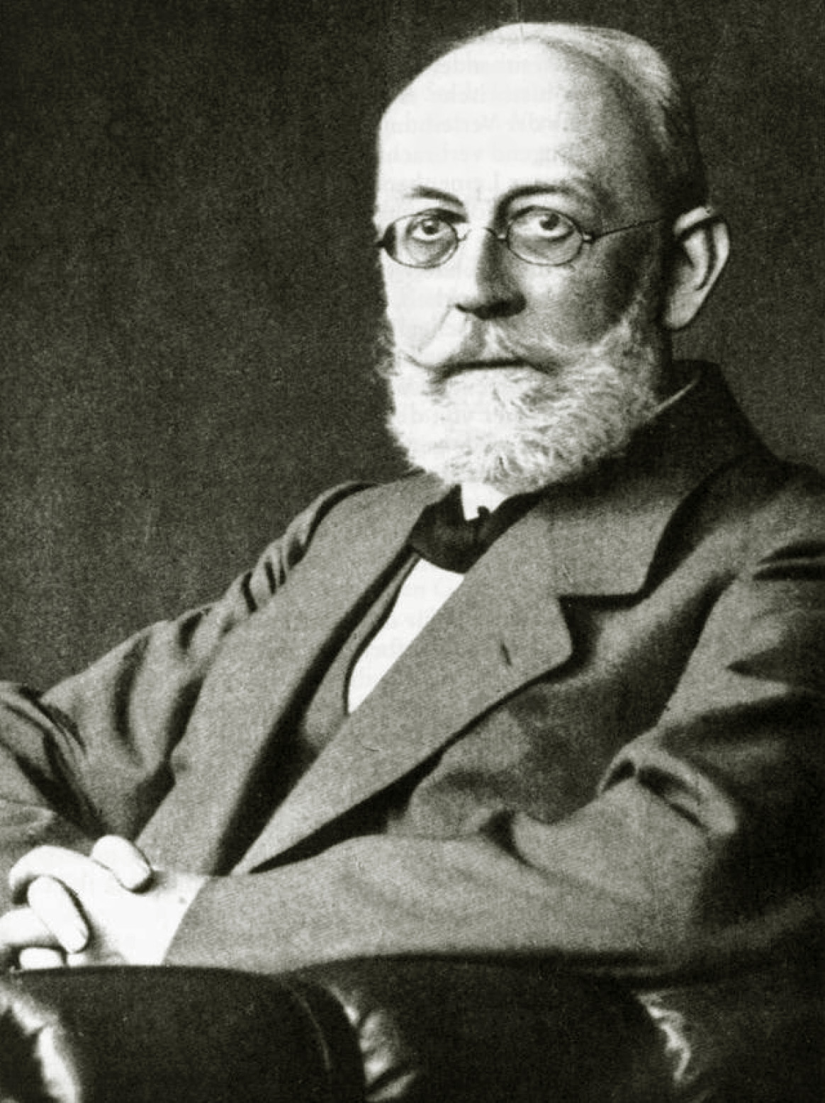 Otto Weerth, Foto von 1929